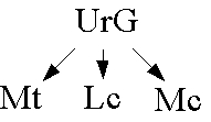 Problème synoptique: hypothèse de l'évangile primitif Auteur:jyp